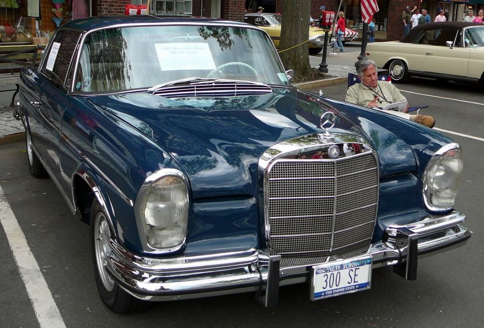 Mercedes-Benz 300 SE Coupé.